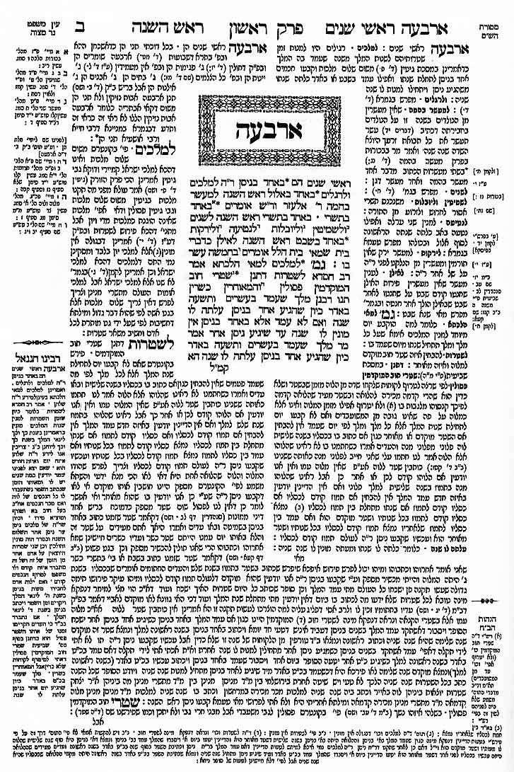 Guemarà Roix ha-Xanà